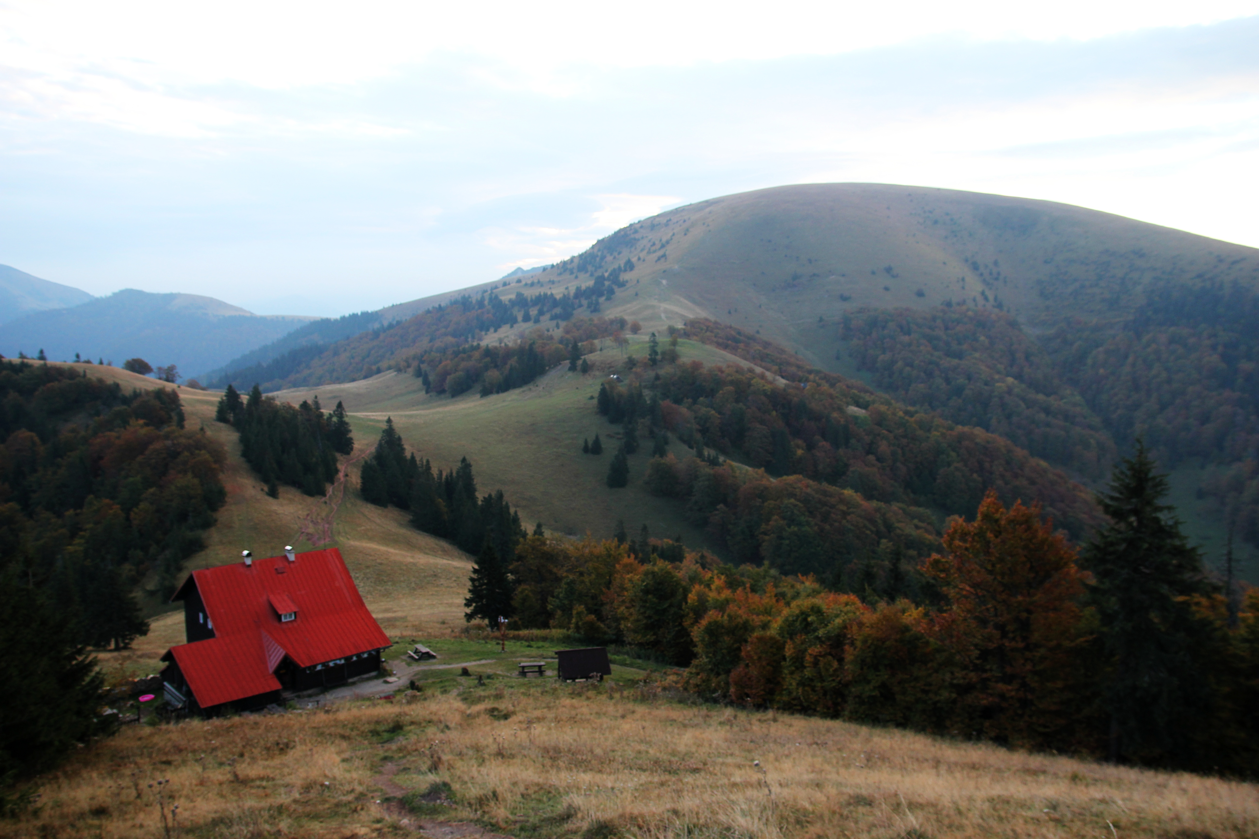 Chata a Ploska z Borisova